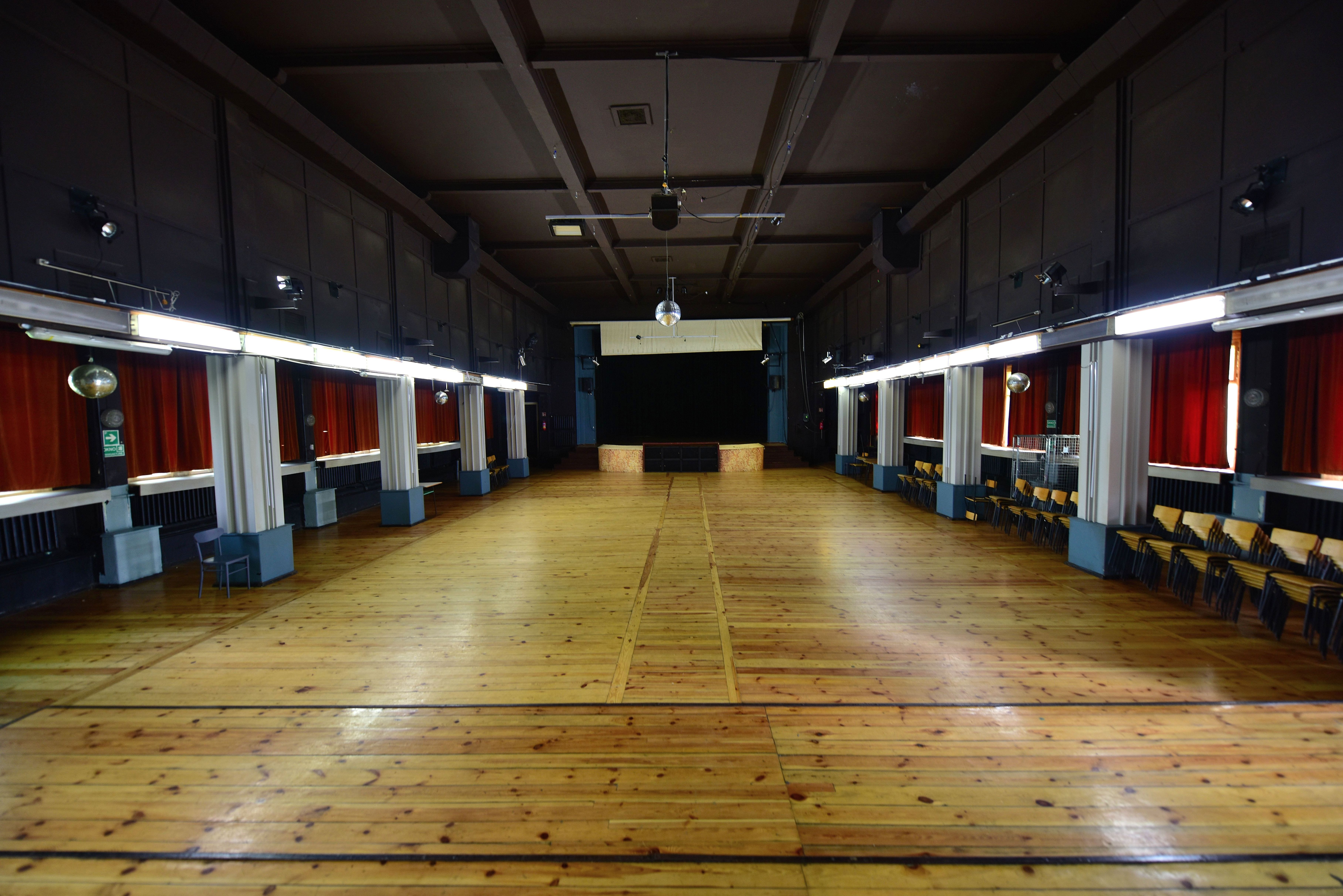 Wnętrze klubu Karuzela w Warszawie